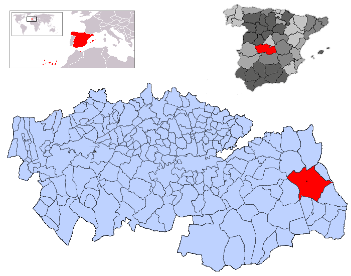 Corral de Almaguer en la provincia de Toledo